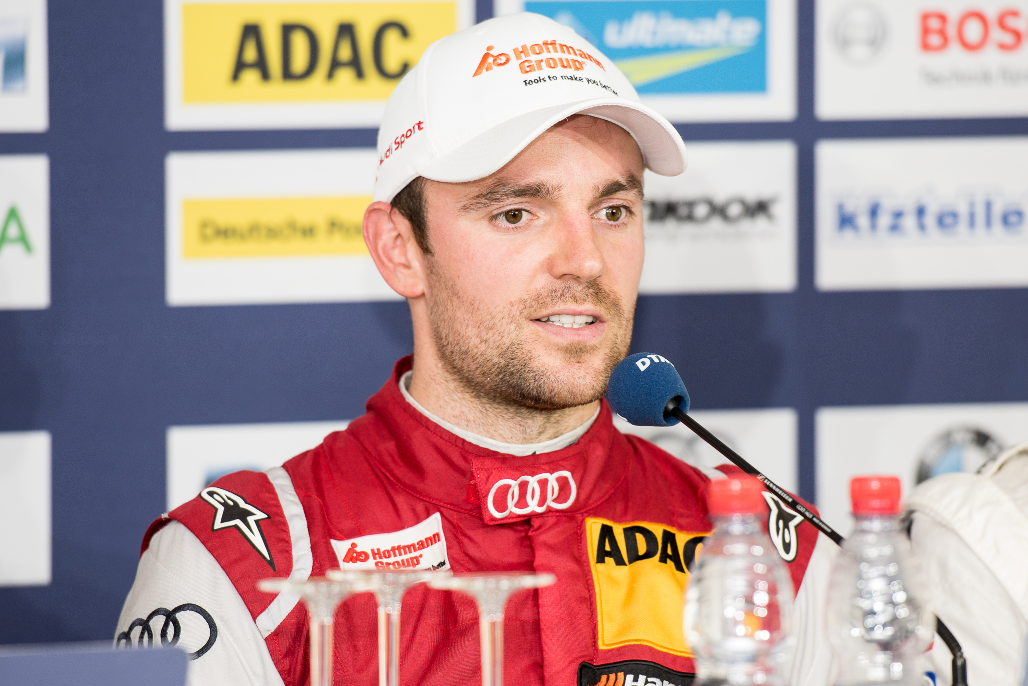 DTM,Deutsche Tourenwagen Masters,Hockenheimring,Jamie Green,Motorsport,Pressekonferenz,Team Rosberg GmbH